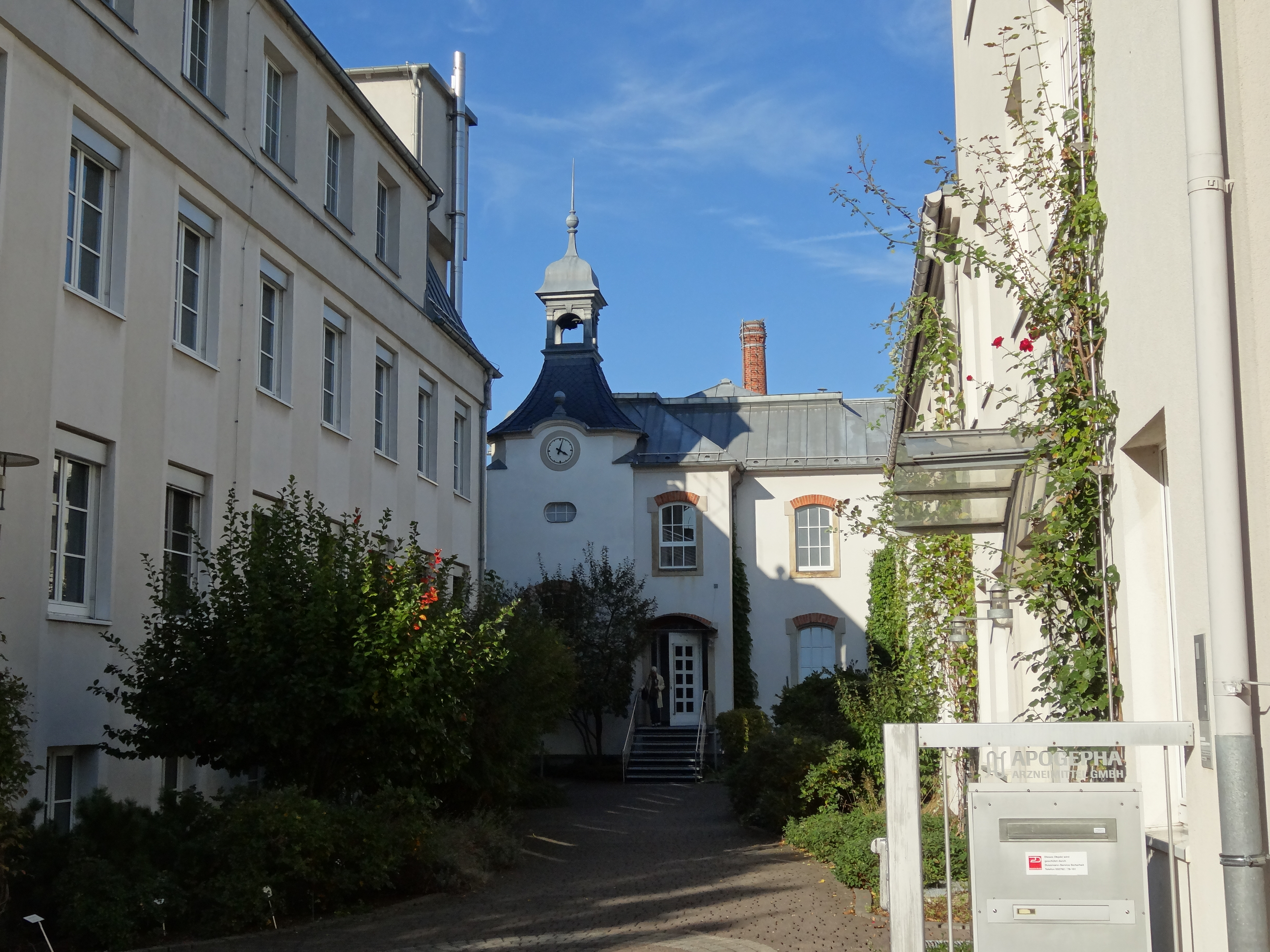 Apogepha, Kyffhäuserstraße 27, Dresden